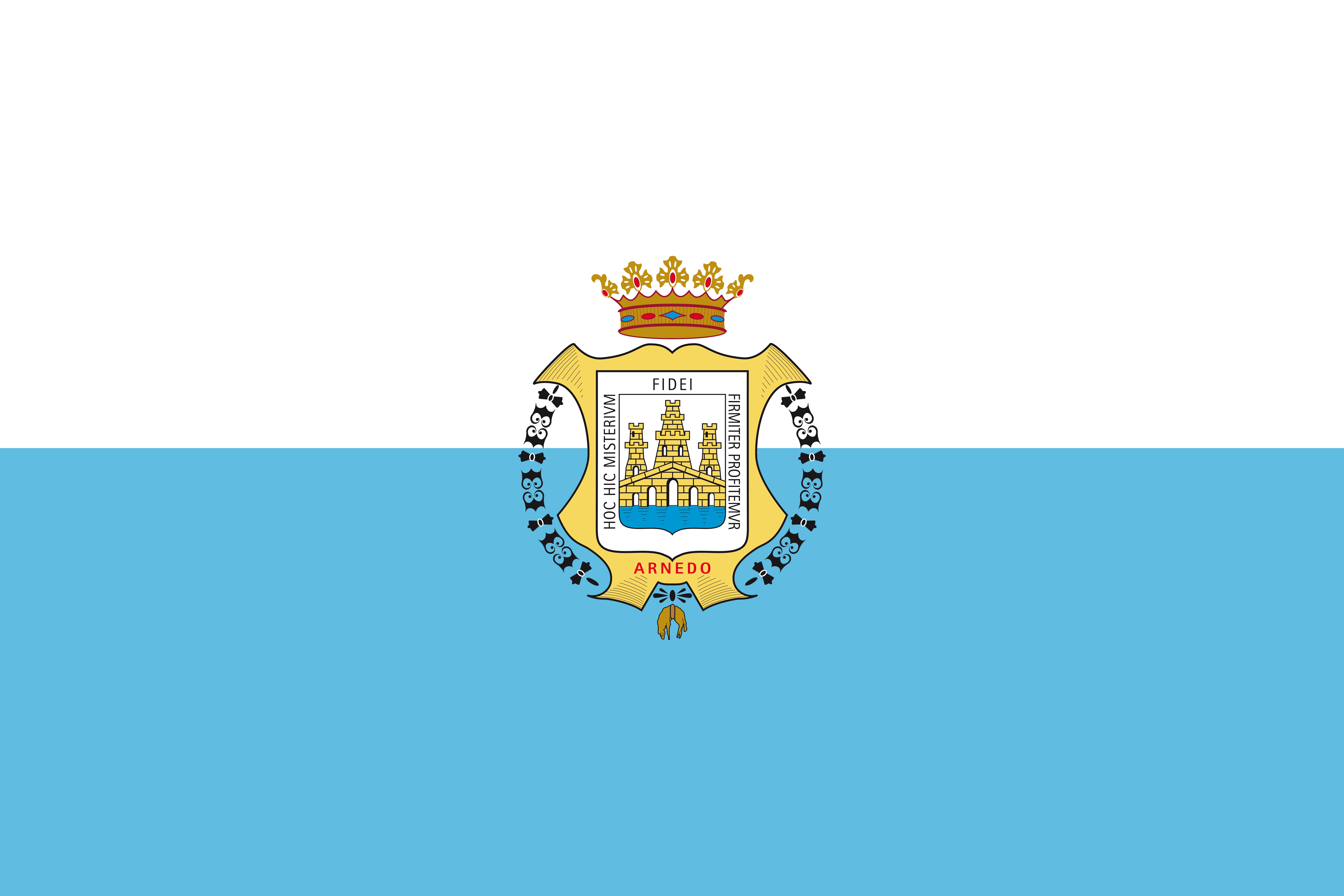 Bandera de la Ciudad de Arnedo (La Rioja)